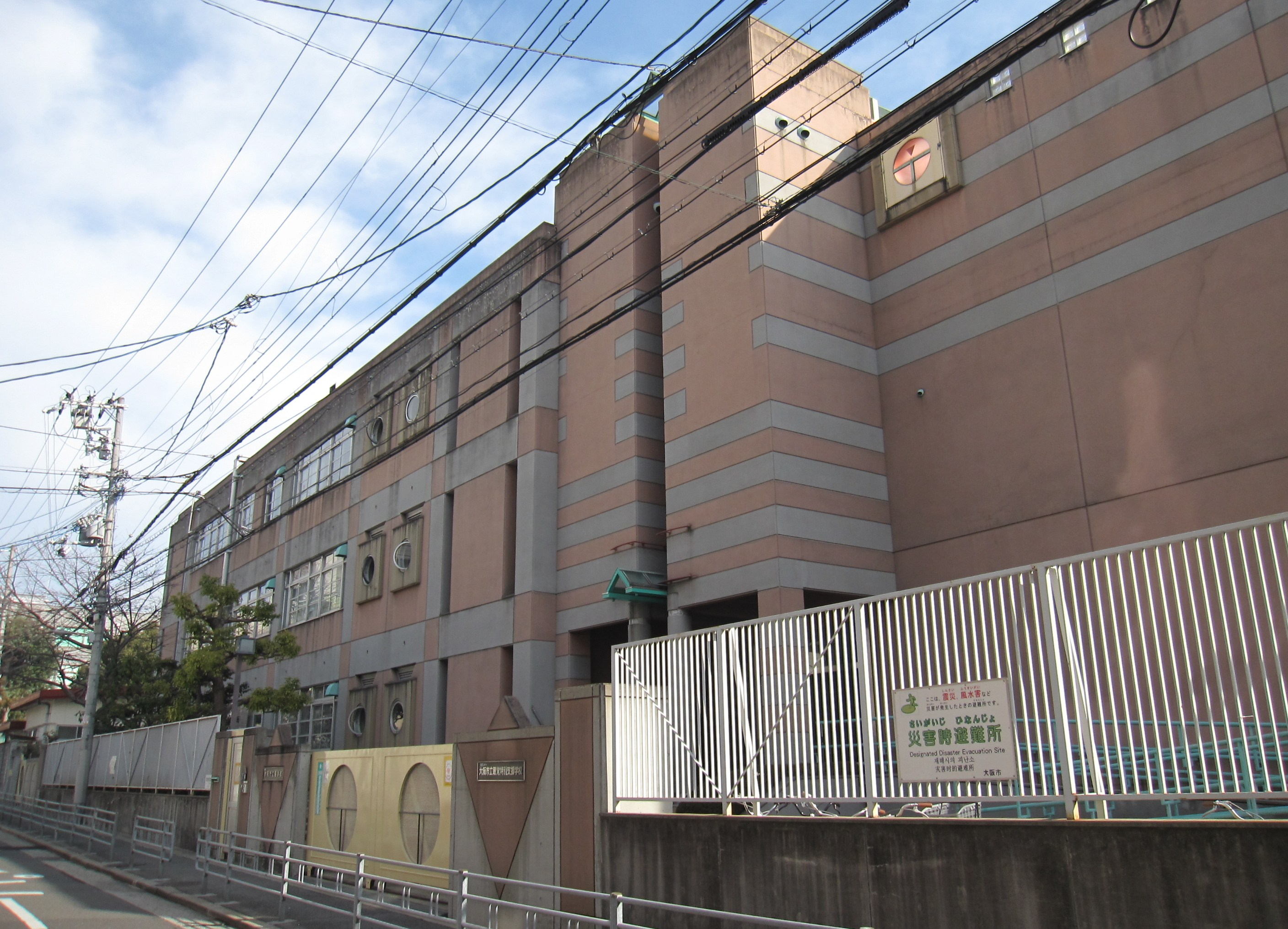 大阪市立聴覚特別支援学校 Canon IXY Digital 920 IS